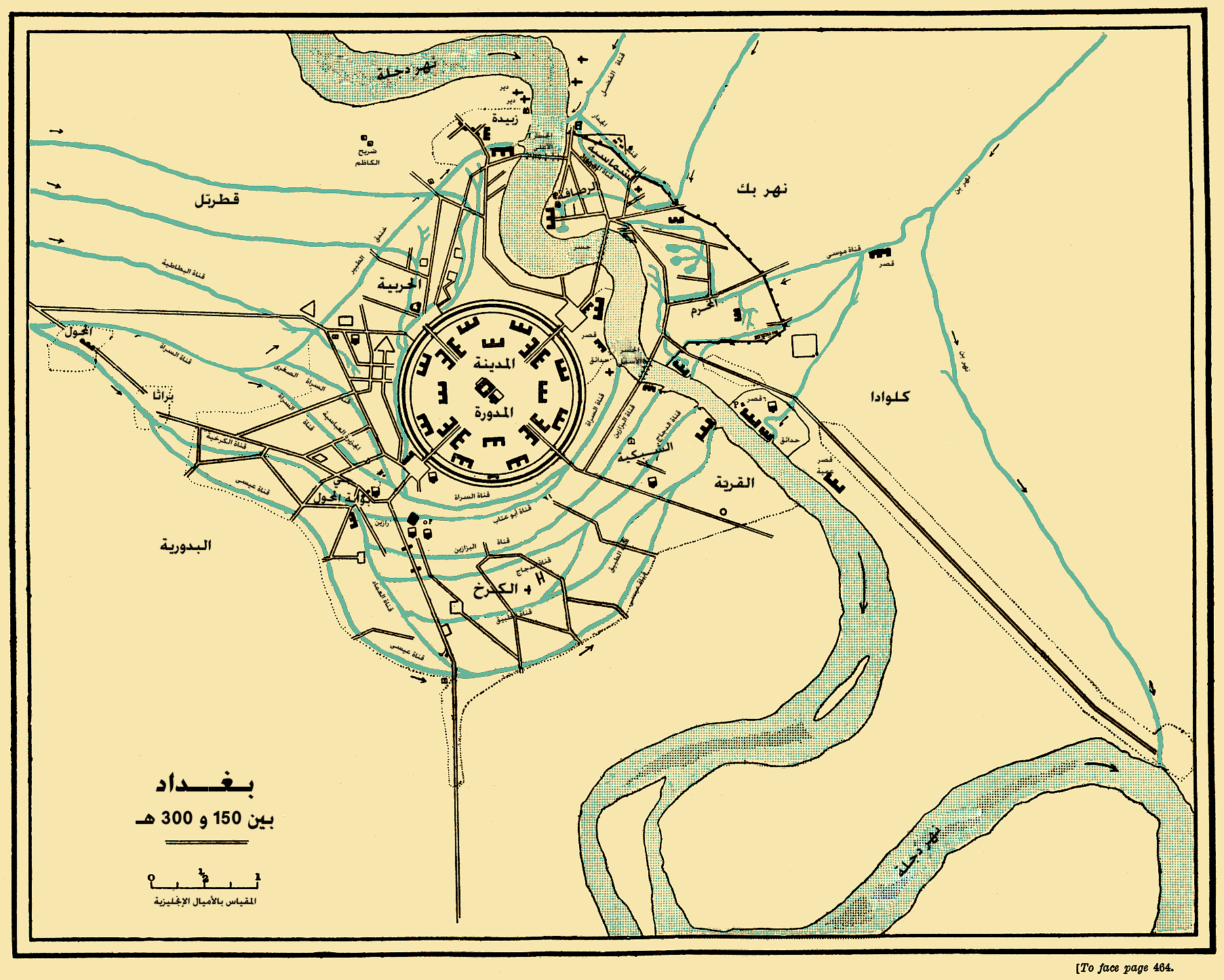 مخطط مدينة بغداد المدورة وضواحيها في بداية العصر العباسي بين عاميّ 767 و 912 م.